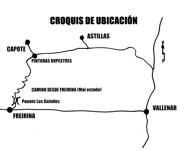 Capote ubicacion